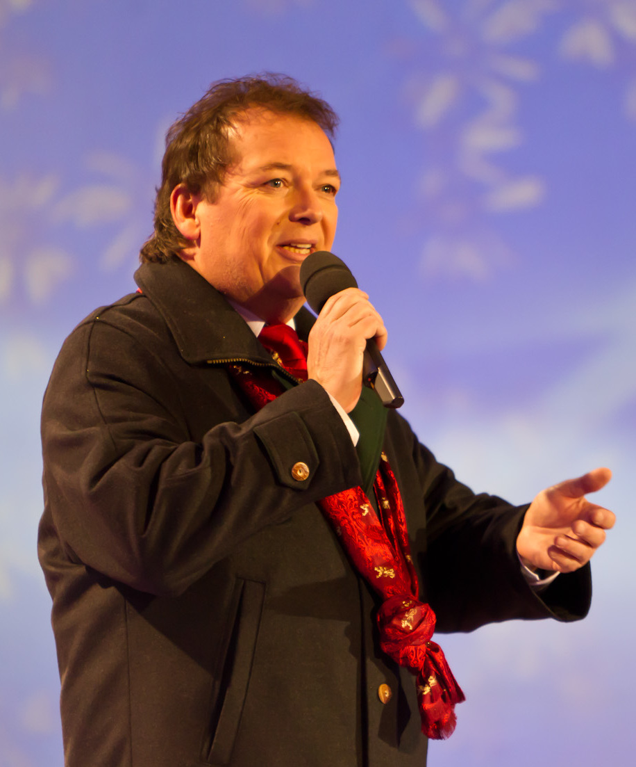 Wenn die Musi spielt - Winter Open Air 2011